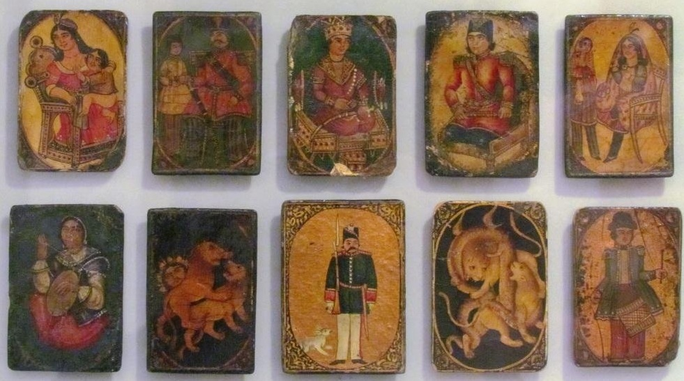 این عکس از کارت‌های بازی گنجفه موجود در "موزه دکتر محسن مقدم" گرفته شده‌است. گنجفه نوعی بازی ورق می‌باشد که به احتمال زیاد در قرن شانزدهم در دربار صفویان بوجود آمده‌است.